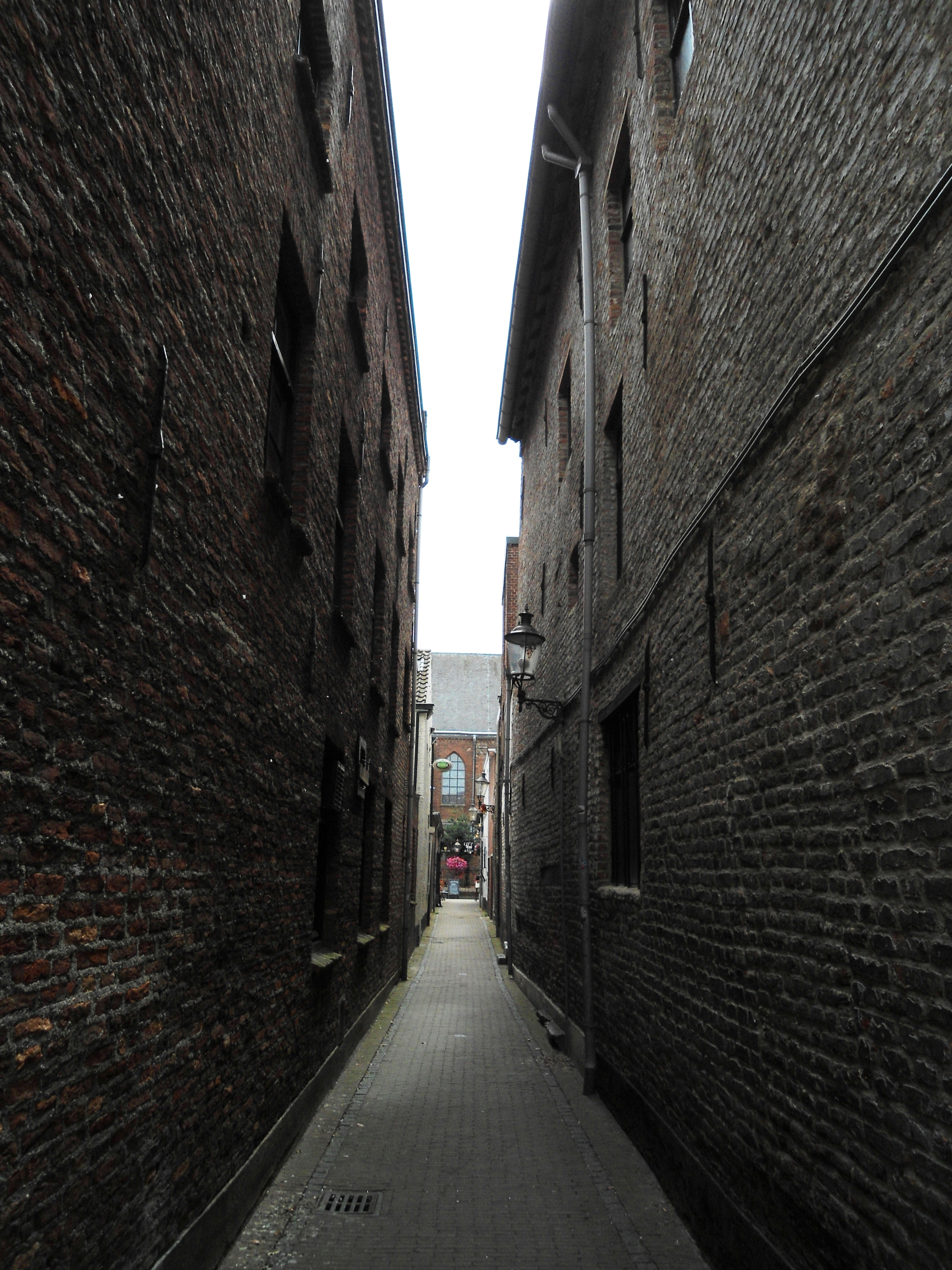 De Ursulastraat gezien vanaf de Klaasstraat.